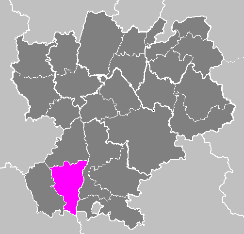 Maps of arrondissements and cantons of France: Arrondissement de Privas.PNG (Région Rhône-Alpes)